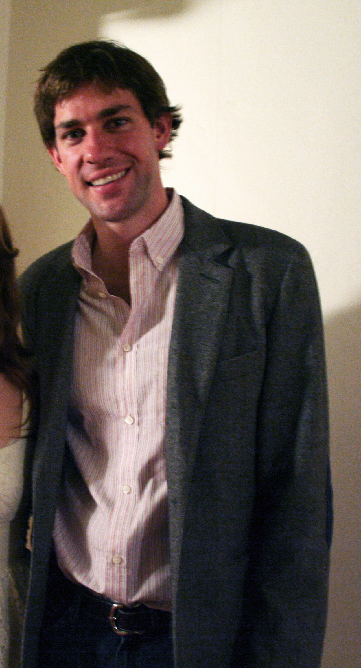 John Krasinski